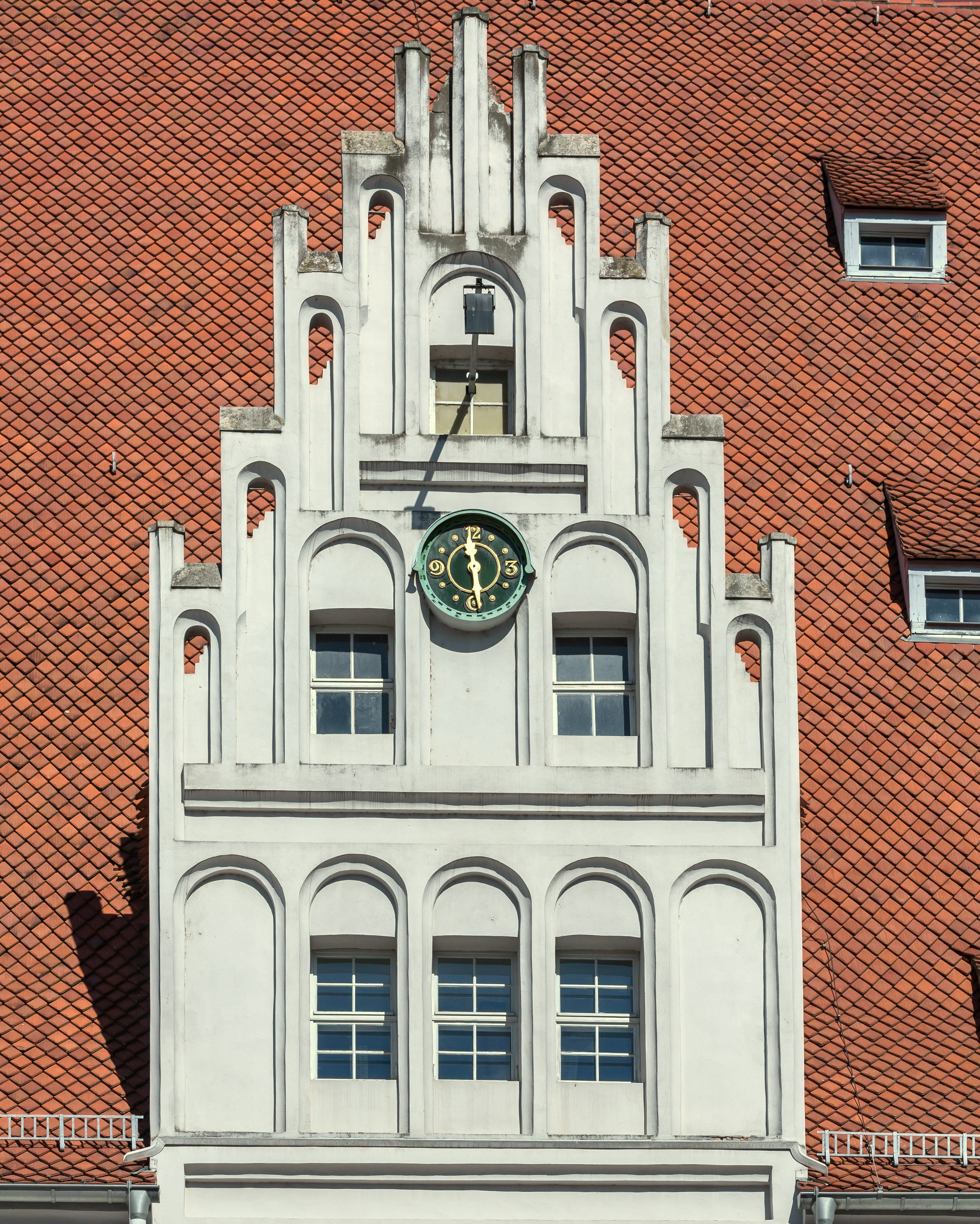 Meißen Markt 1 Rathaus von 1472–1486 in geschlossener Bebauung und Ecklage , drei gestufter Zwerchgiebel